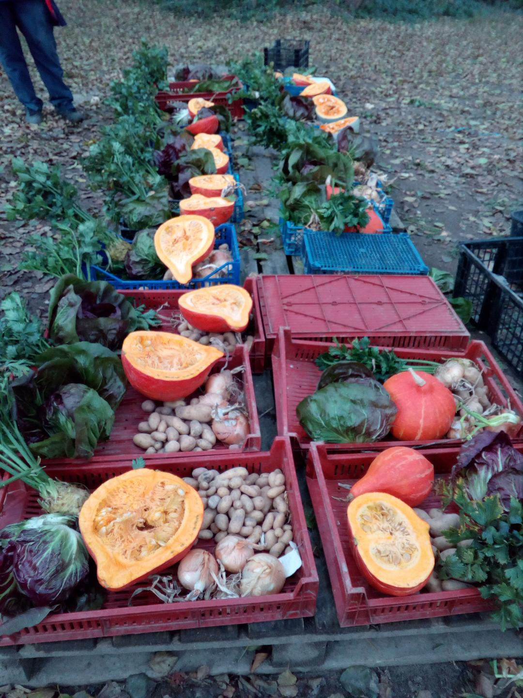 Jardinage collectif, panier de légumes (jardinons ensemble)